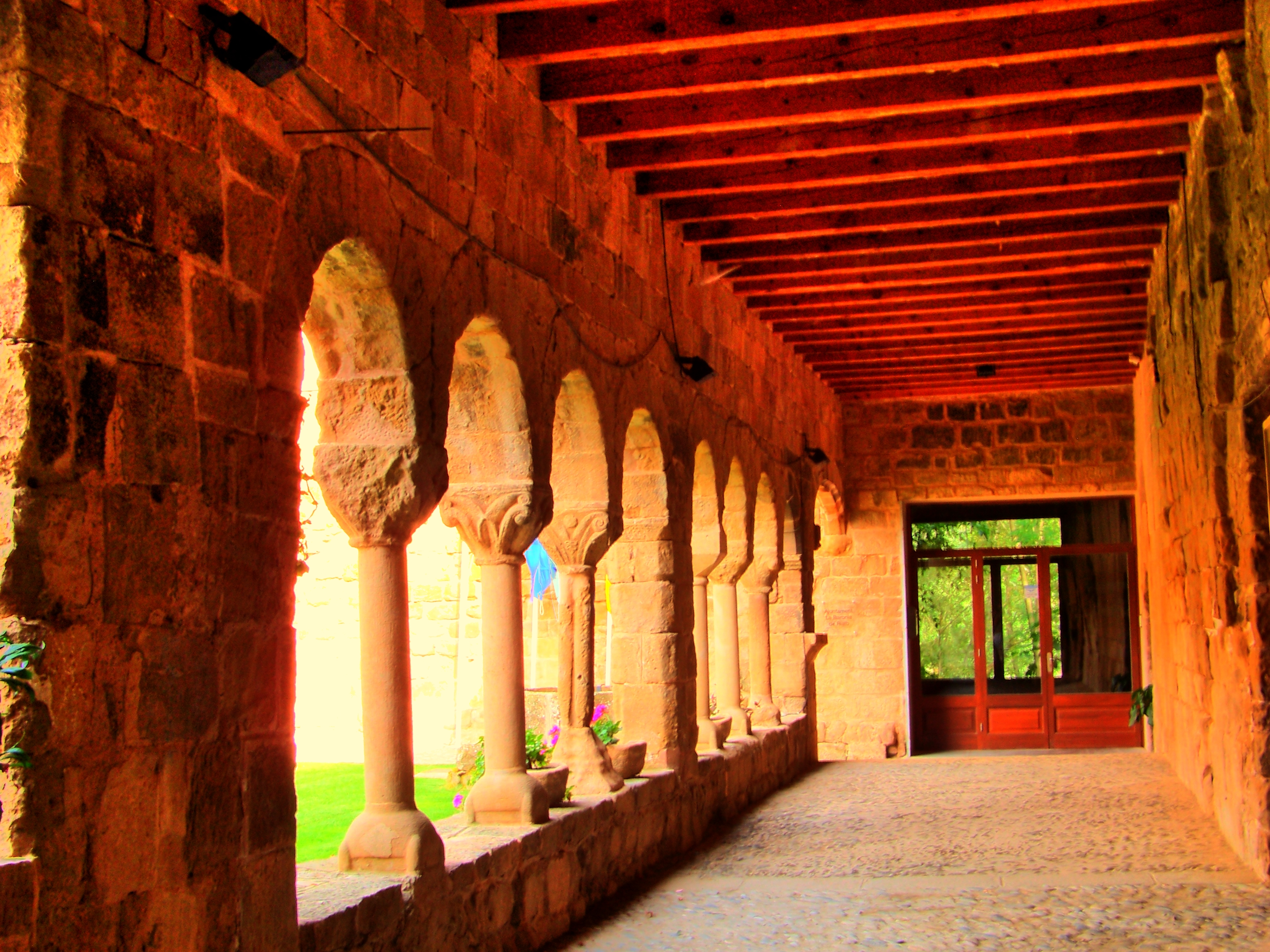 Monestir de Santa Maria de Gualter (La Baronia de Rialb)